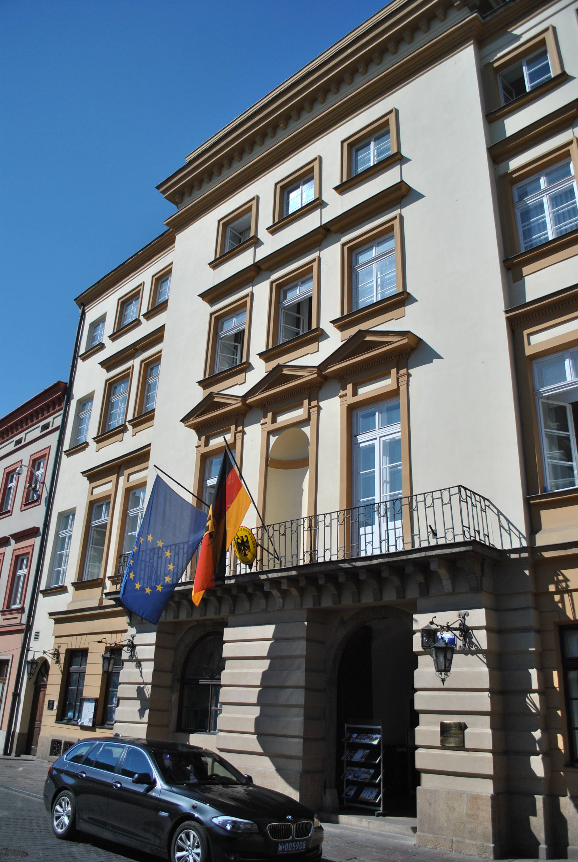 Kamienica przy ulicy Stolarskiej 7 w Krakowie, widok od frontu.